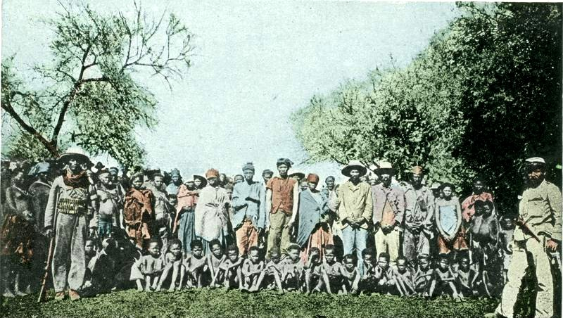 Kriegsgefangene Hottentotten Deutsch-Süd-West-Afrika 5100 / Franz Spenker, Hbg. 19. Postkarte. Carte postale.